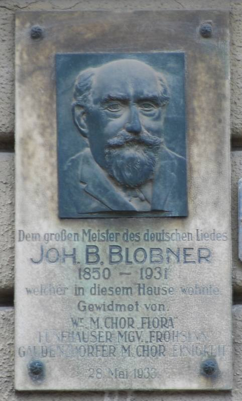 Gedenktafel für Johann Baptist Blobner in der Wilhelmstraße 30 in Wien-Meidling